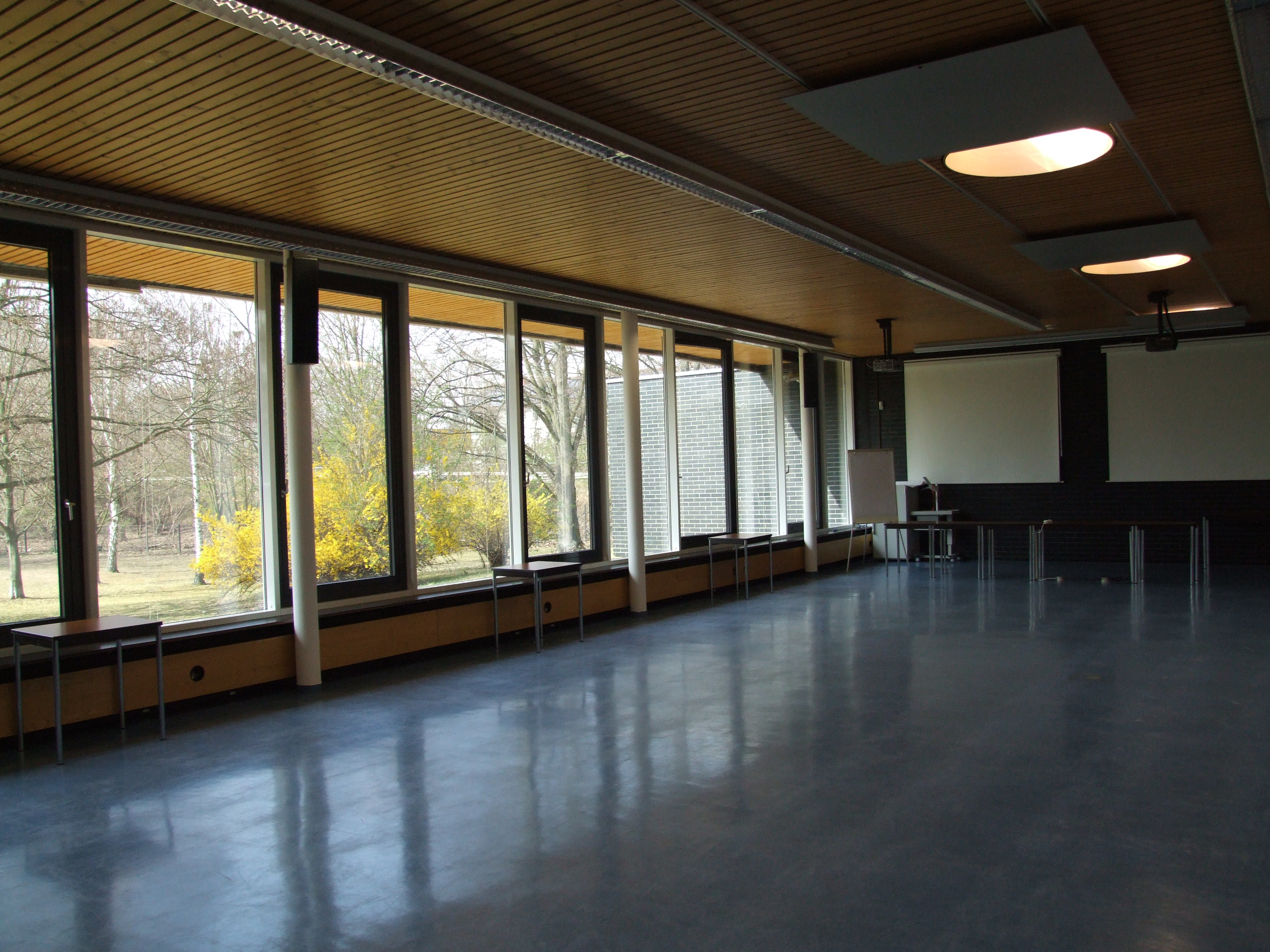 Universität Speyer, Freiherr-vom-Stein-Str. 2: Hörsaal 1 mit Glaswand zur Natur geöffnet. Die Scherwand und das wie die Decke in Holz gestaltete Vordach setzen den Raum im Freien fort.